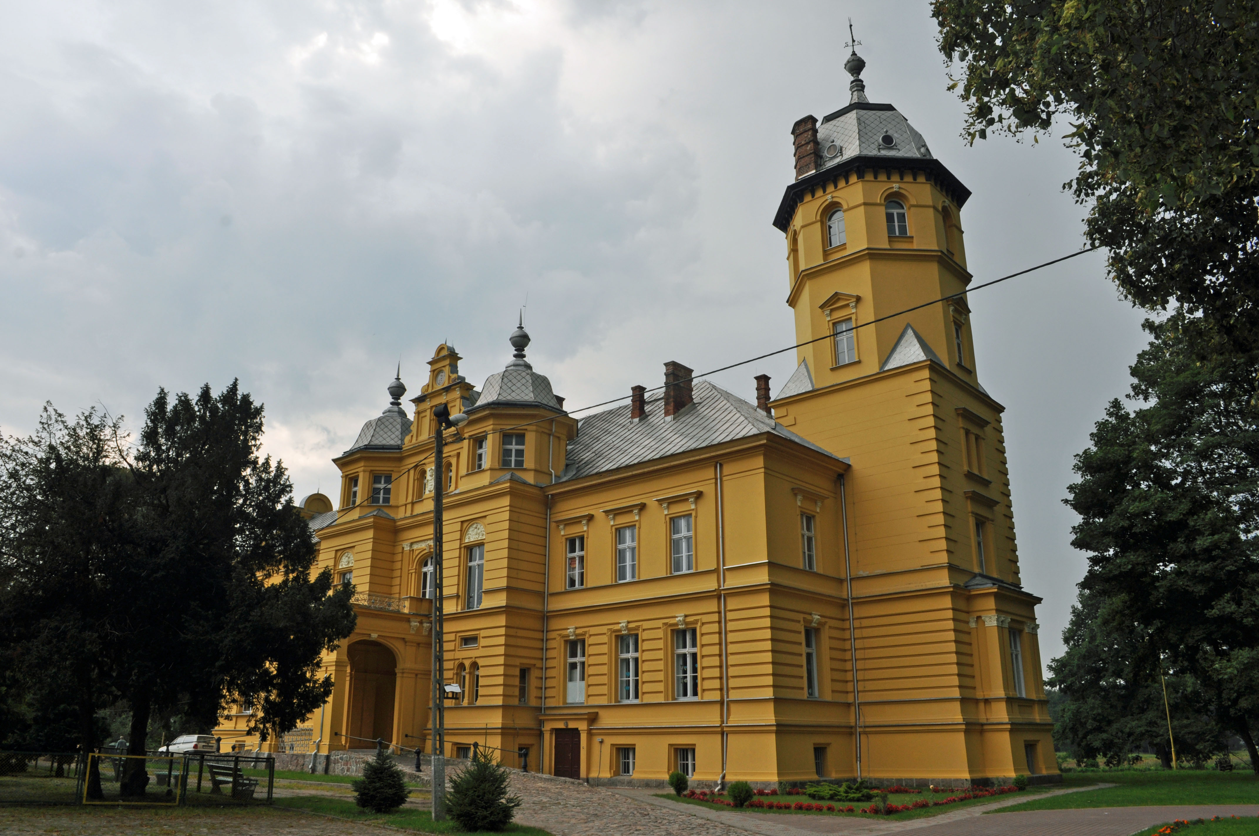 siehe Dateiname Schloss Stuchow (Stuchowo), ehemals Sitz der Familie von Ploetz, heute in Świerzno (deutsch: Schwirsen, Kreis Cammin in Pommern) ist ein Dorf und Sitz einer Landgemeinde im Powiat Kamieński (Kreis Cammin in Pommern) in der polnischen Woiwodschaft Westpommern.